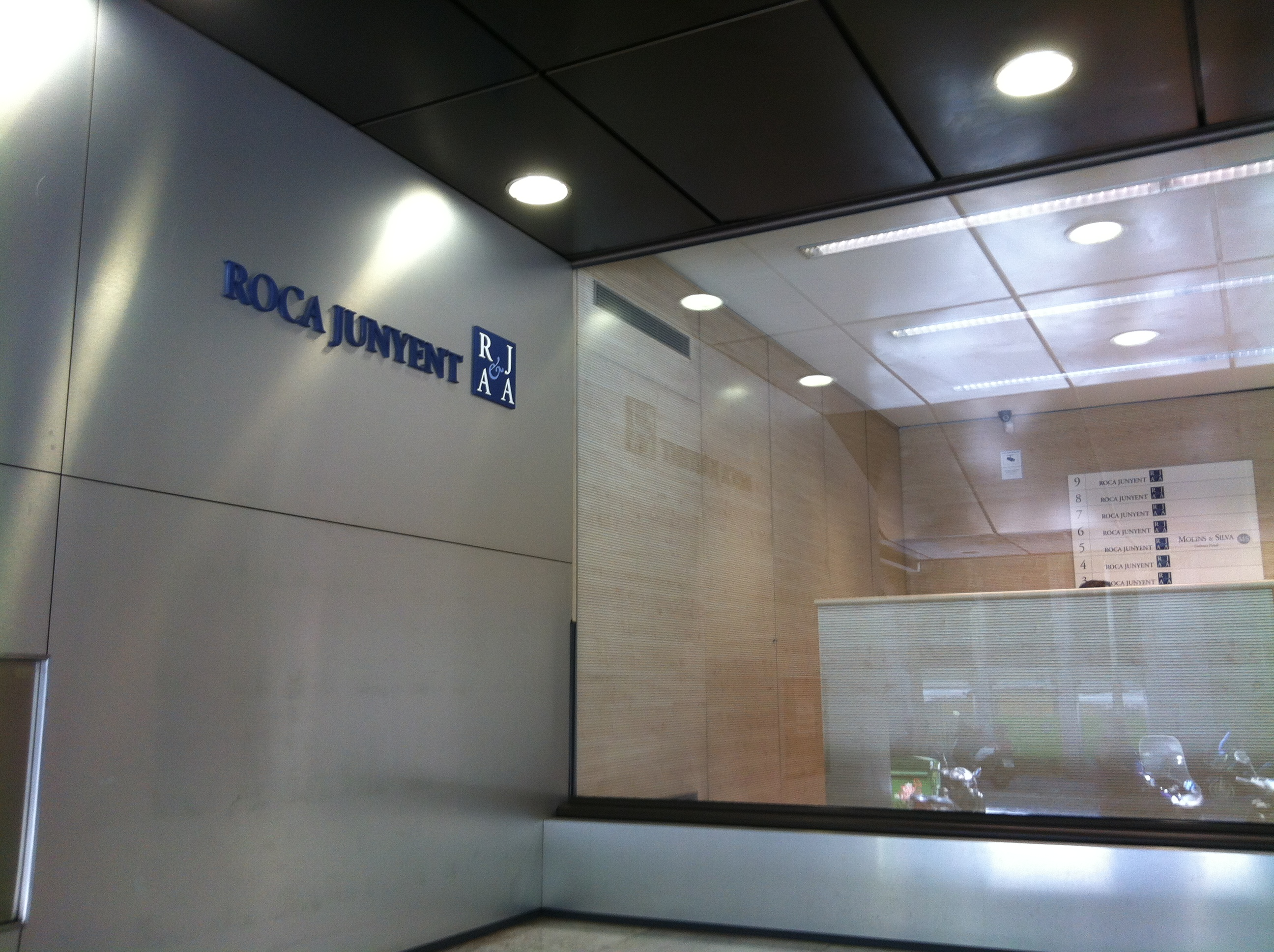 Despatx Roca Junyent, carrer Aribau, 198, Barcelona